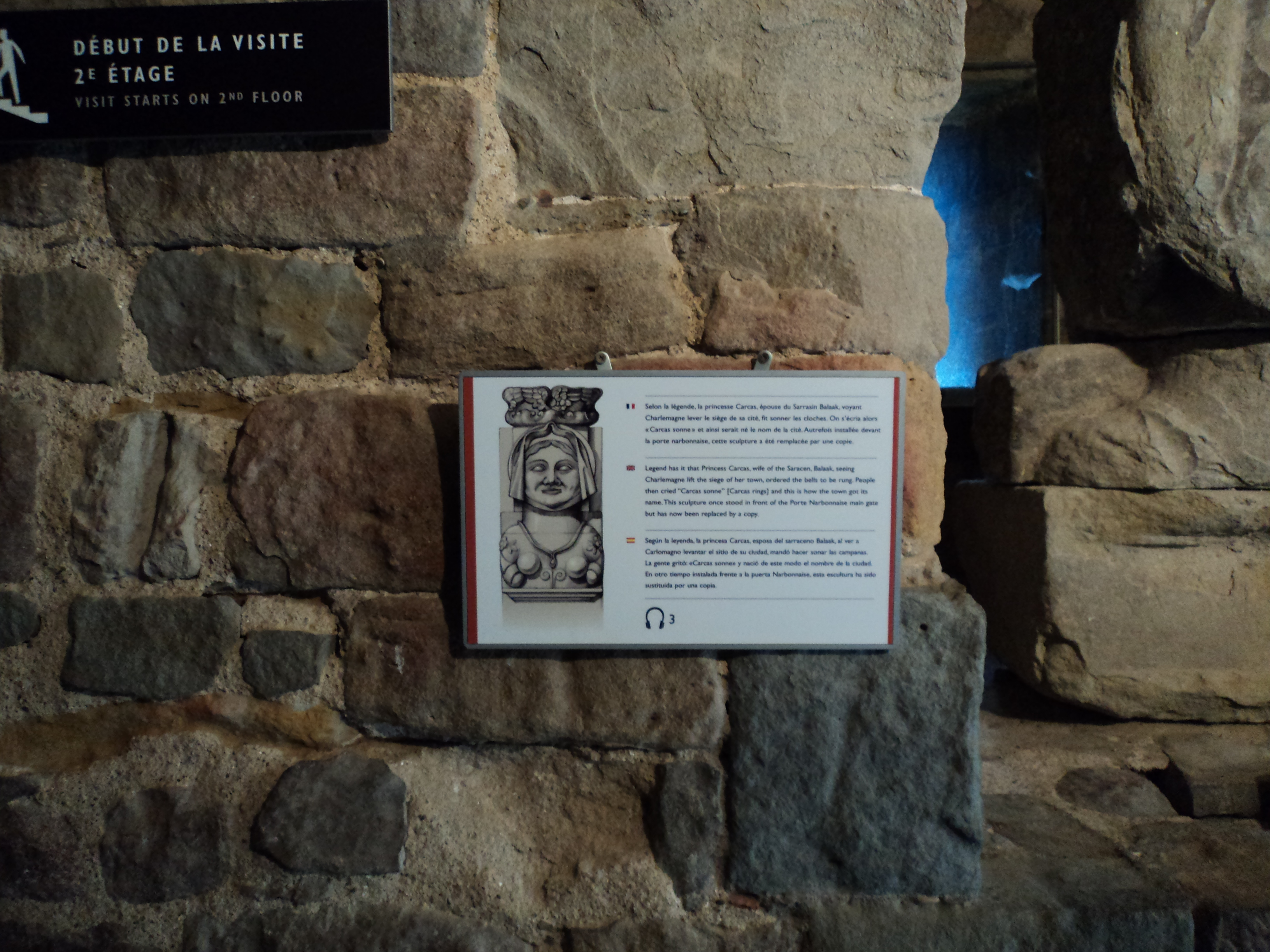 Descripcvion de Carcasona